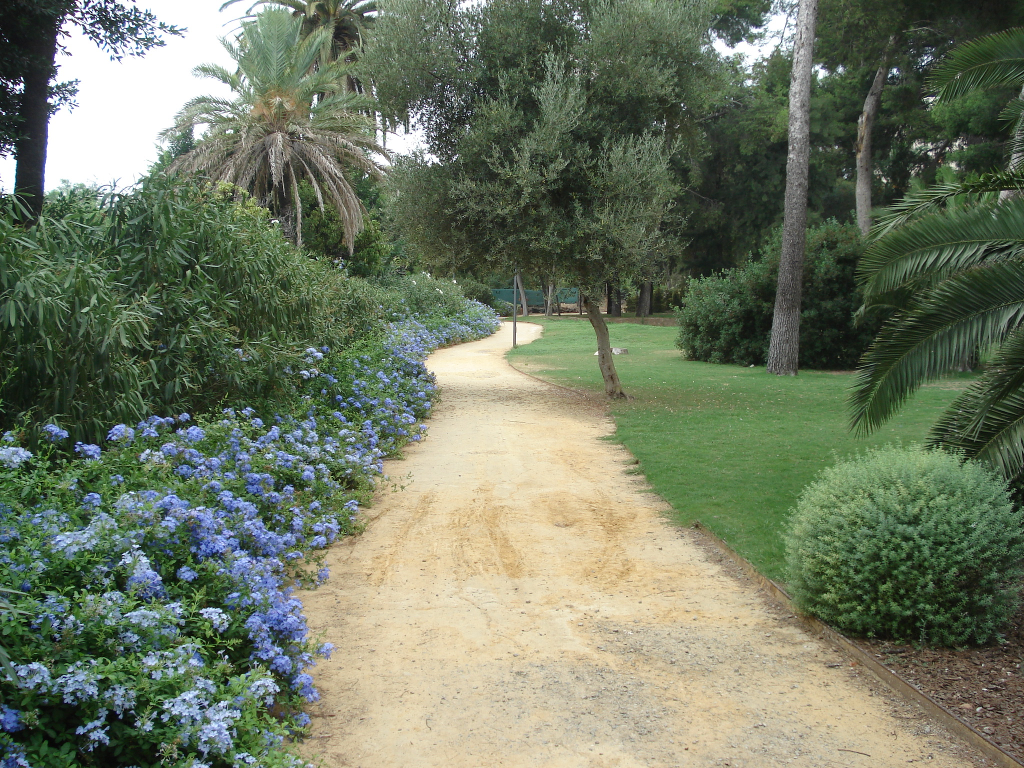 Camino en el Jardín Escénico de El Altillo